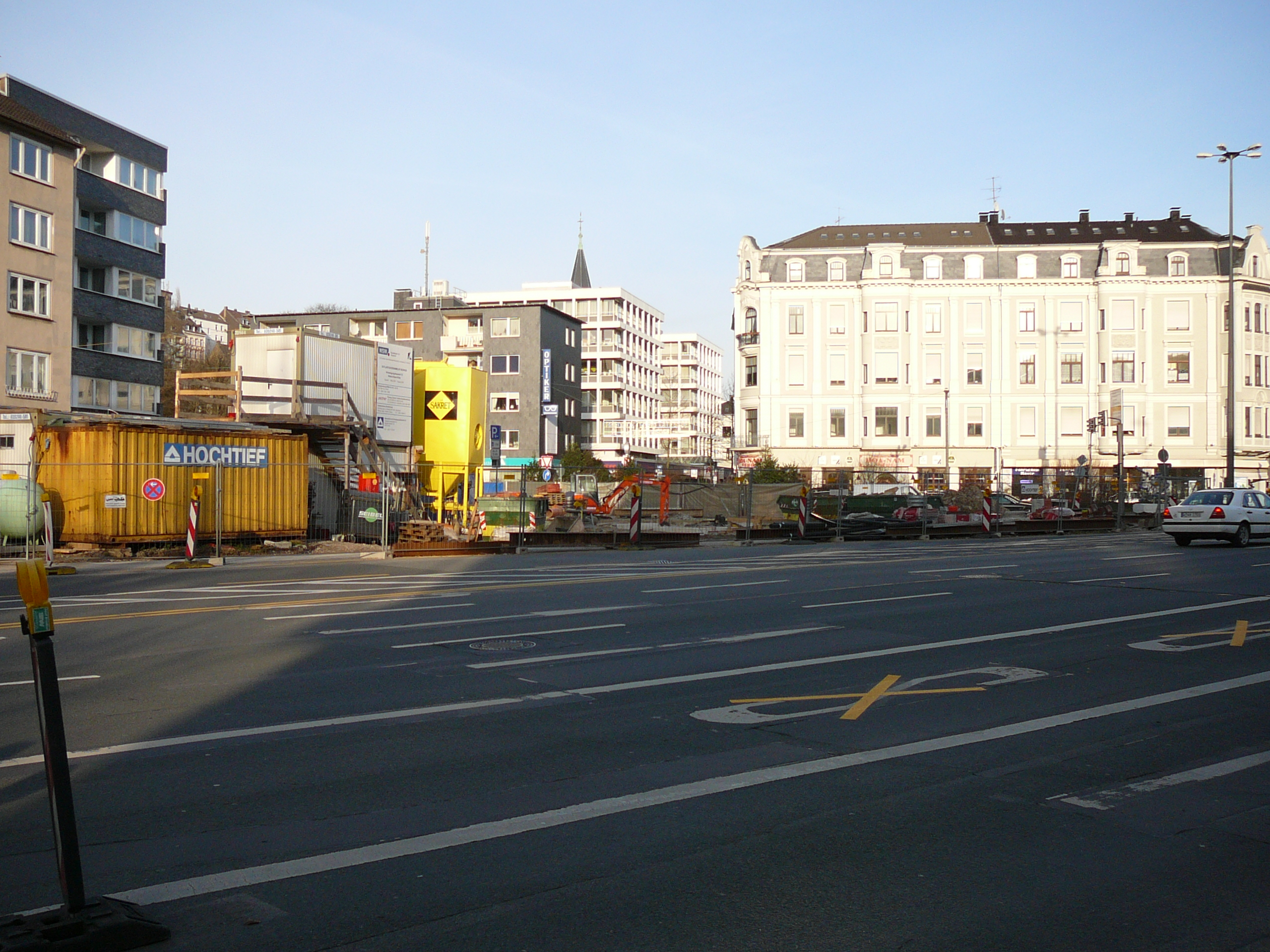 Friedrich-Ebert-Str., Wuppertal